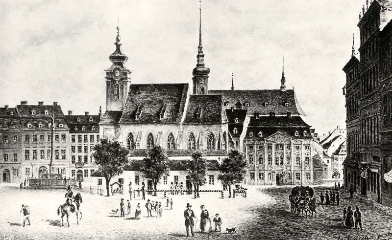 Archivní foto dnes již neexistujícího kostela svatého Mikuláše (v popředí), který stál na Náměstí svobody v Brně (před 1870). Vzadu je vidět kostel svatého Jakuba.